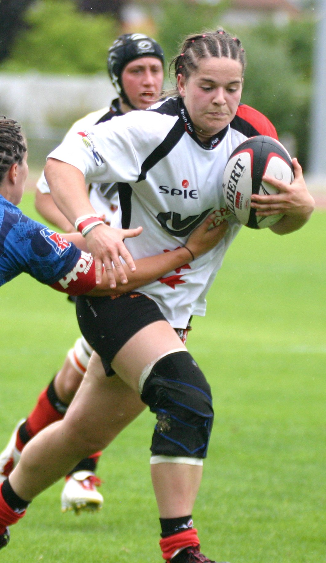 Helene Ezanno, joueuse de rugby à XV internationale française, évoluant au Stade rennais rugby